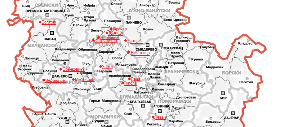 Srpski (latinica): Autori: Korisnik:Milicevic.marta, Korisnik:Milena Petrovic 0404 i Korisnik:Lenkaleni Korišćeno delo: Map of Serbia municipalities (with Kosovo).png Autor:Bože pravde